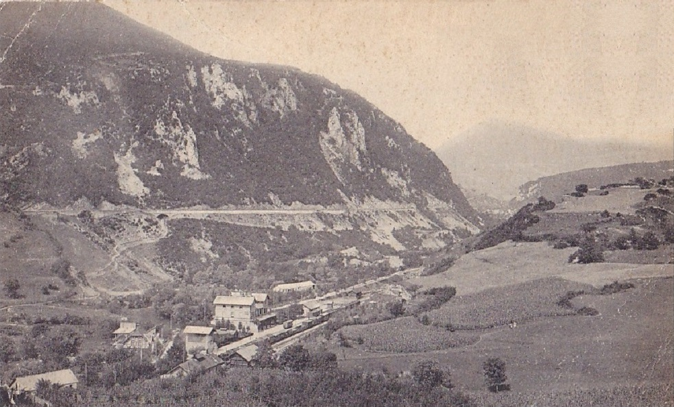 Bahnhof Jajce auf einer Postkarte mit einer Briefmarke des SHS-Staates